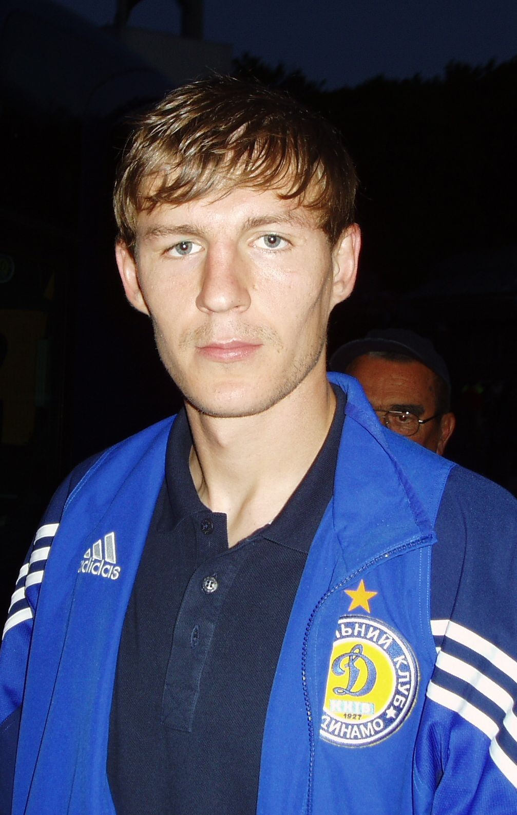 Шацких Максим Александрович